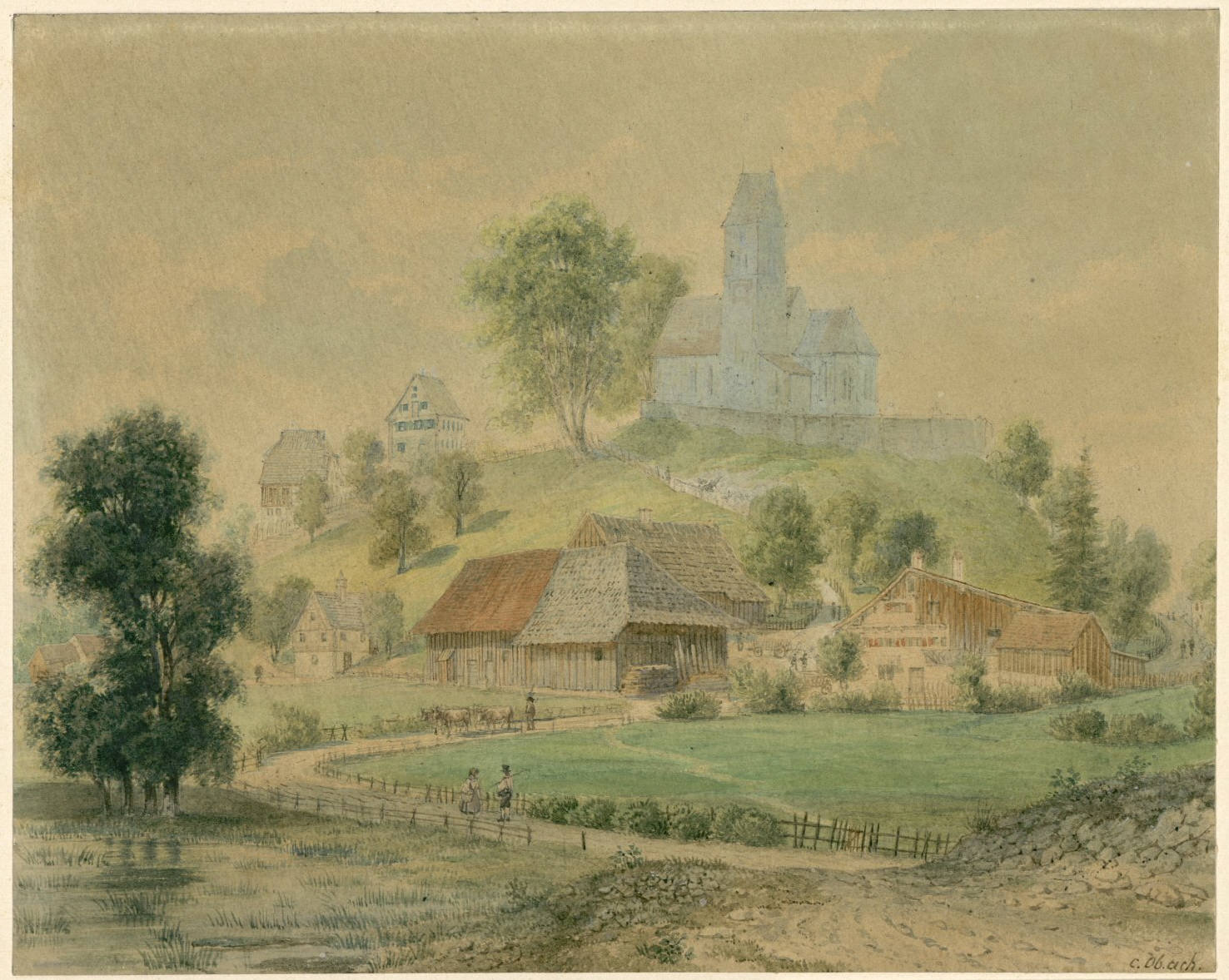 Leupolz (bei Wangen). Aquarell, Schefold 4434.